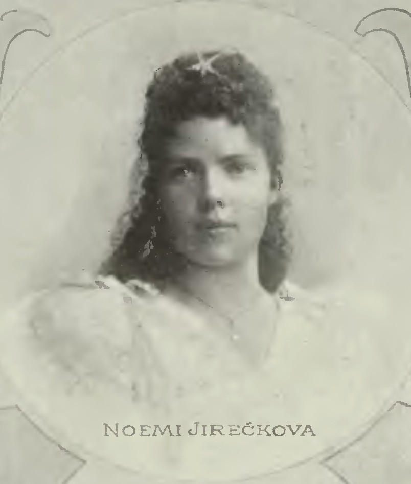 Portrét – Noemi Jirečková (1874-1963), Česká klavíristka.